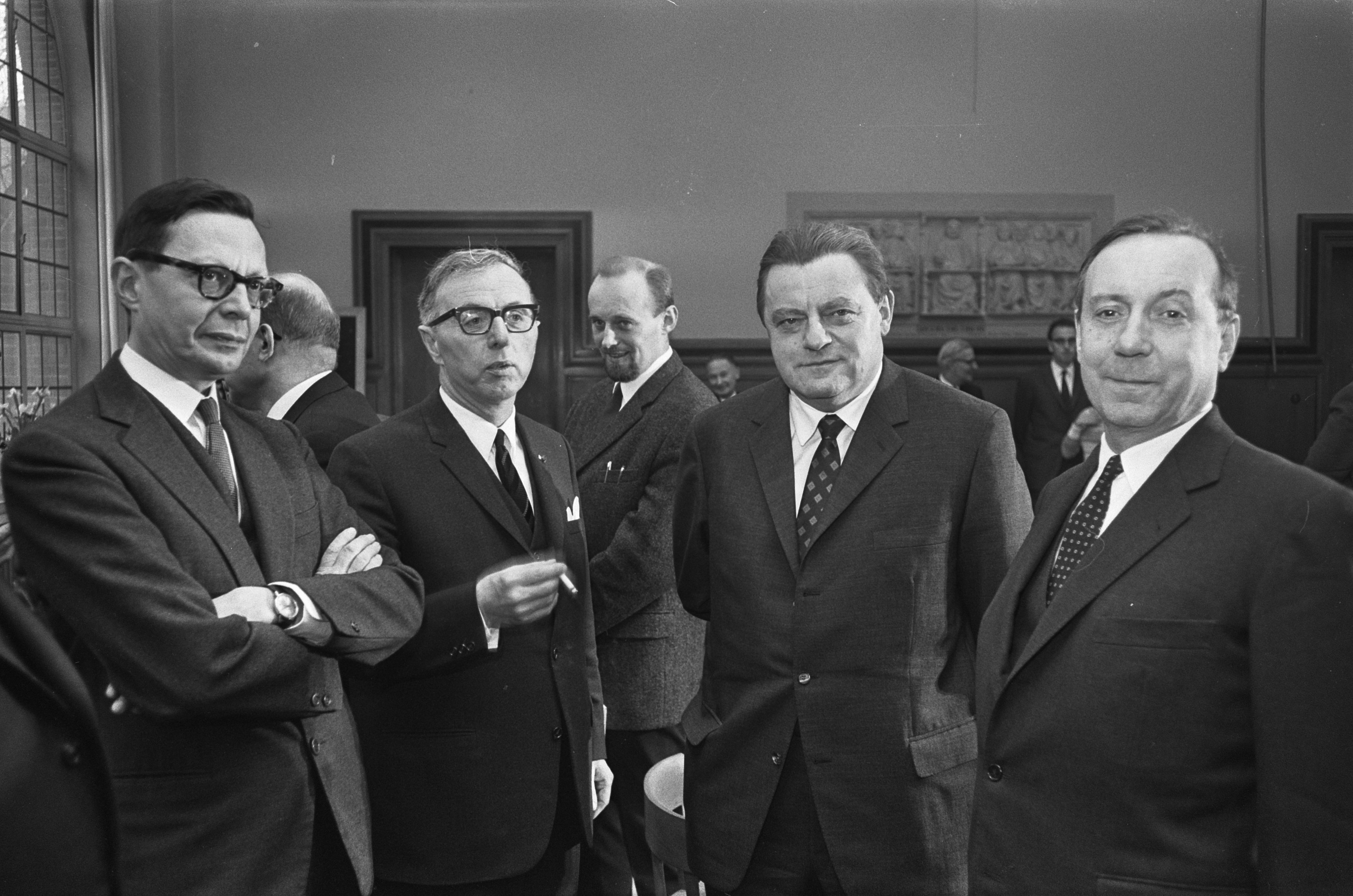 Collectie / Archief : Fotocollectie Anefo Reportage / Serie : [ onbekend ] Beschrijving : Ministers van Financien van EEG bijeen in Vredespaleis te Den Haag , v.l.n.r. Marjolin (EEG), Zijlstra, Strauss en Debre (Frankrijk) Datum : 16 januari 1967 Locatie : Den Haag, Frankrijk Trefwoorden : ministers Persoonsnaam : Debre, Strauss Instellingsnaam : EEG, Vredespaleis Fotograaf : Koch, Eric / Anefo Auteursrechthebbende : Nationaal Archief Materiaalsoort : Negatief (zwart/wit) Nummer archiefinventaris : bekijk toegang 2.24.01.05 Bestanddeelnummer : 919-9873